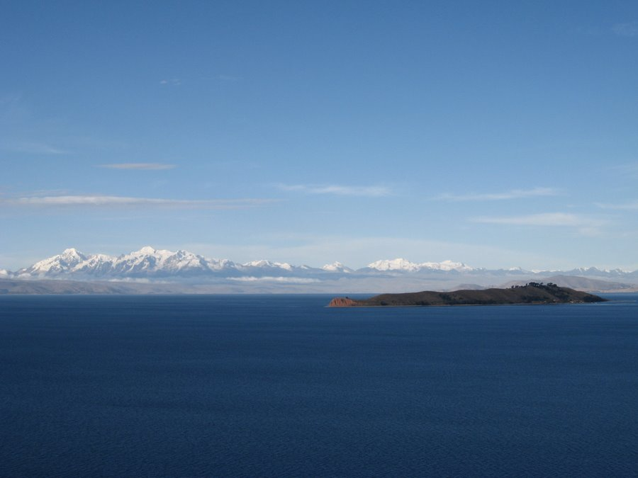 vista de la cordillera real y la isla de la luna desde la isla del sol en el lago Titicaca en Bolivia.